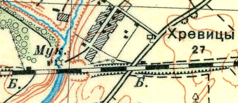 Топографическая карта Ленинградской области, квадрат О-35-22-Г-г (Торма), деревня Хревицы.